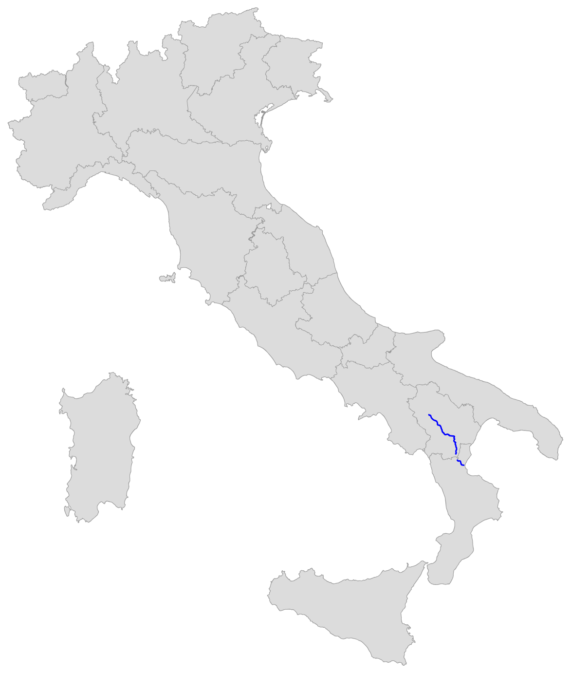 Percorso della SS 92 dell'Appennino Meridionale